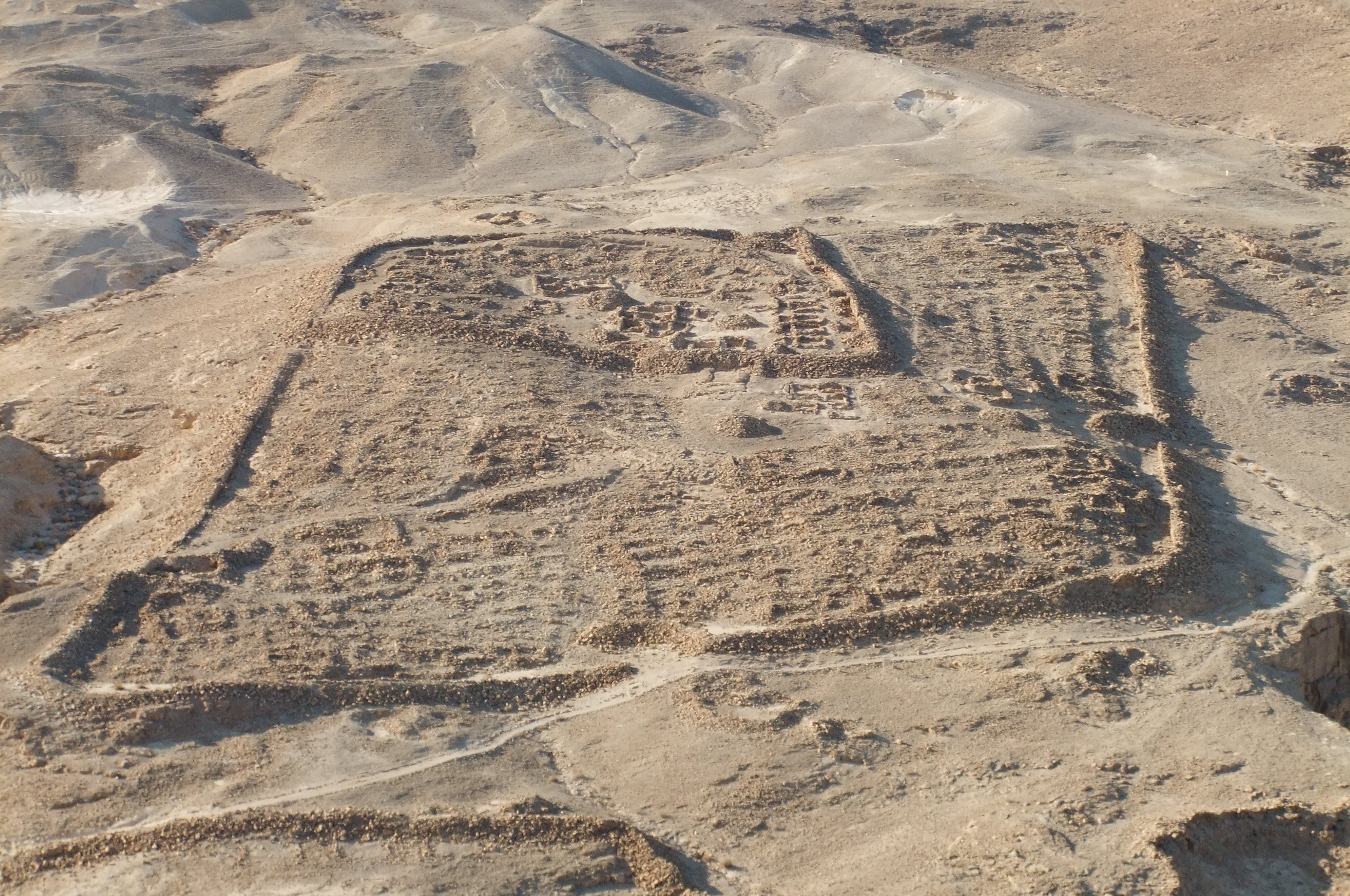 Masada